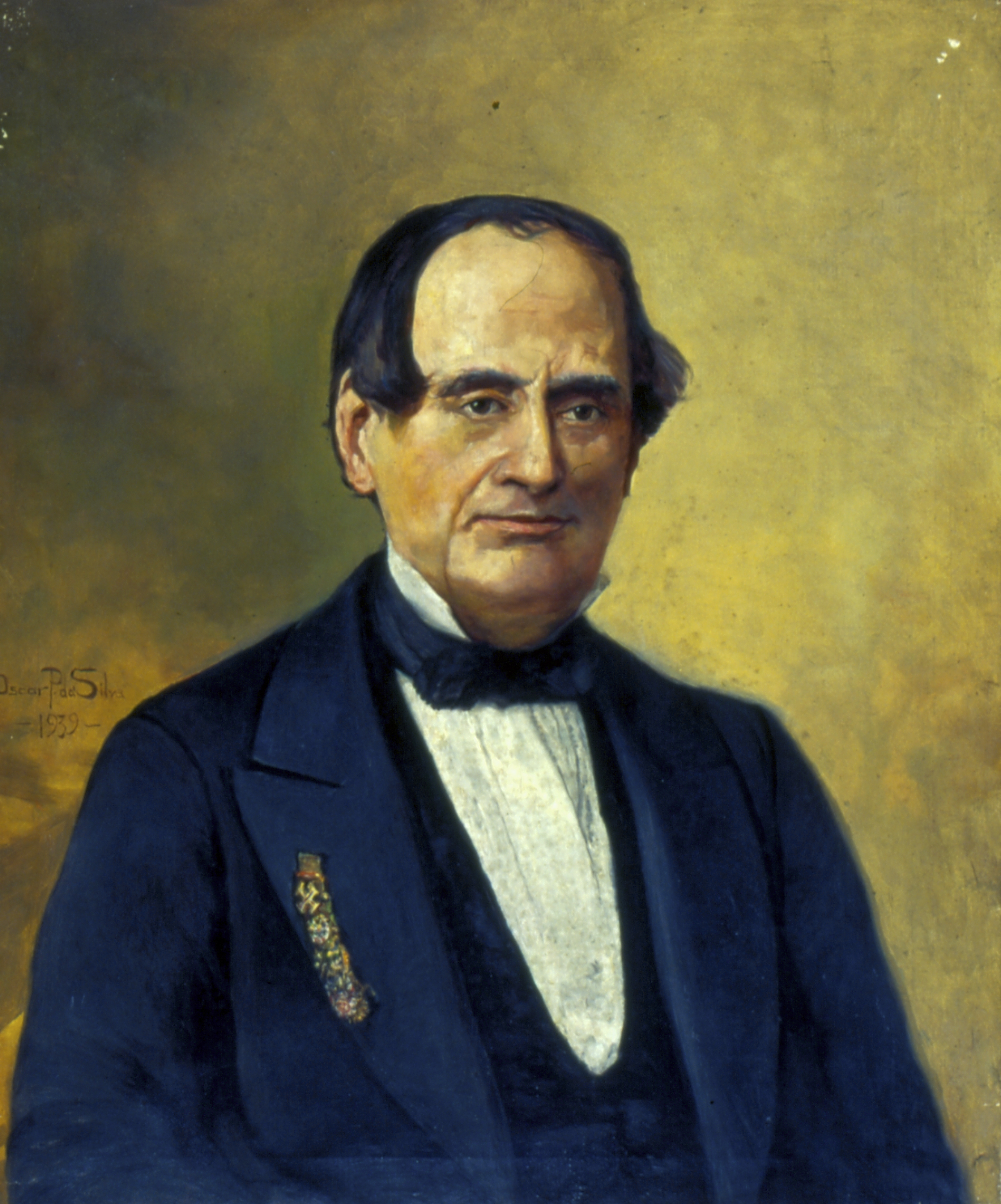 Obra que integra o acervo do Museu Paulista da USP. Coleção Fundo Museu Paulista - FMP